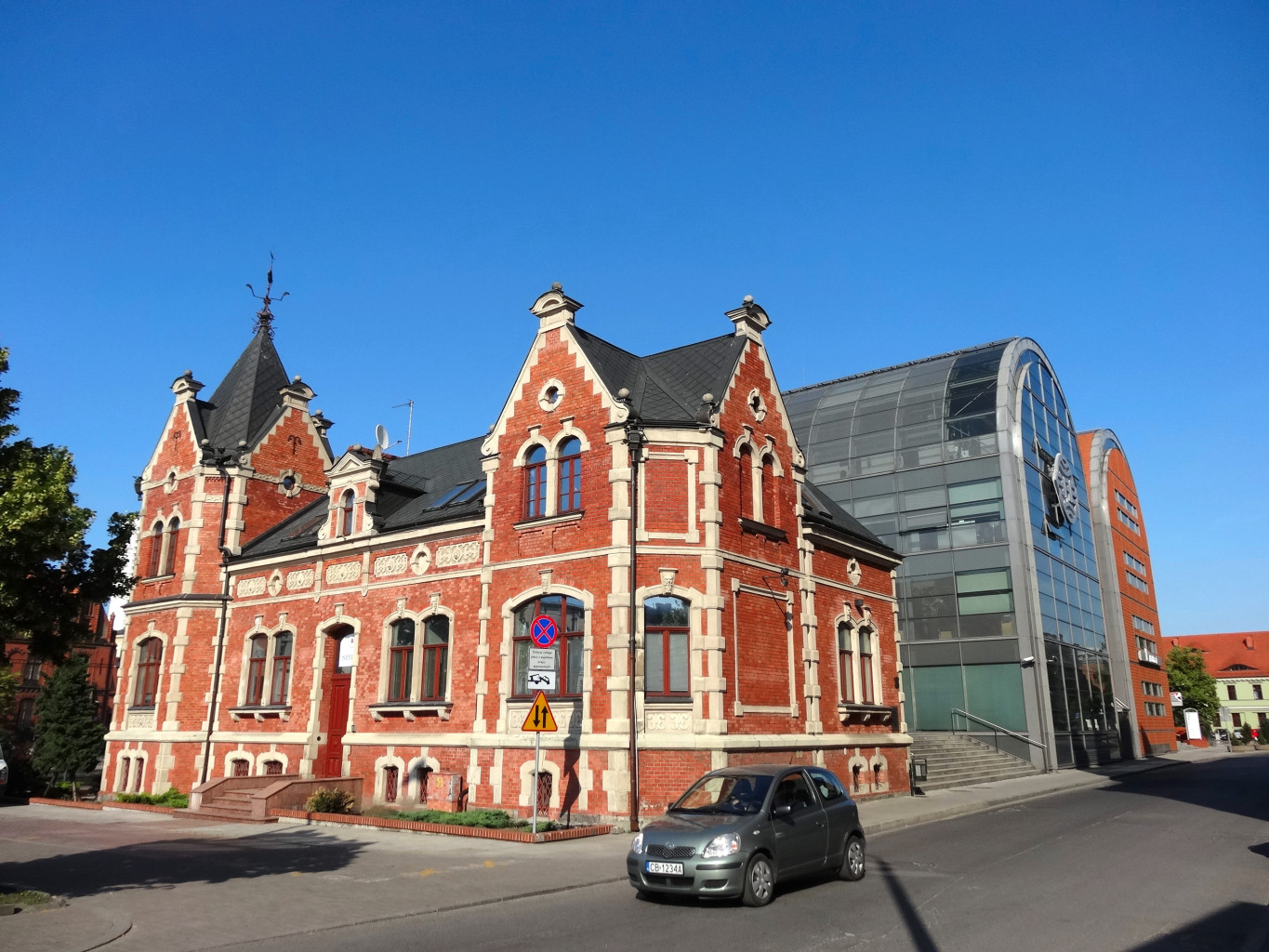 Pałacyk Lloyda w Bydgoszczy (zbud. 1886), dawna siedziba przedsiębiorstw żeglugowych, położony w strefie staromiejskiej nad Brdą.